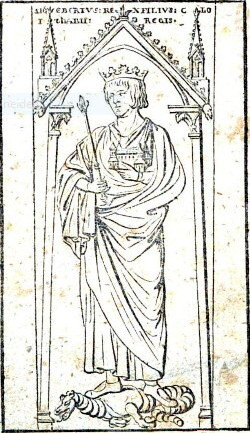 Holzschnitt von Friedrich Wilhelm Gubitz, das Grabmal Siegberts I. in Soissons darstellend